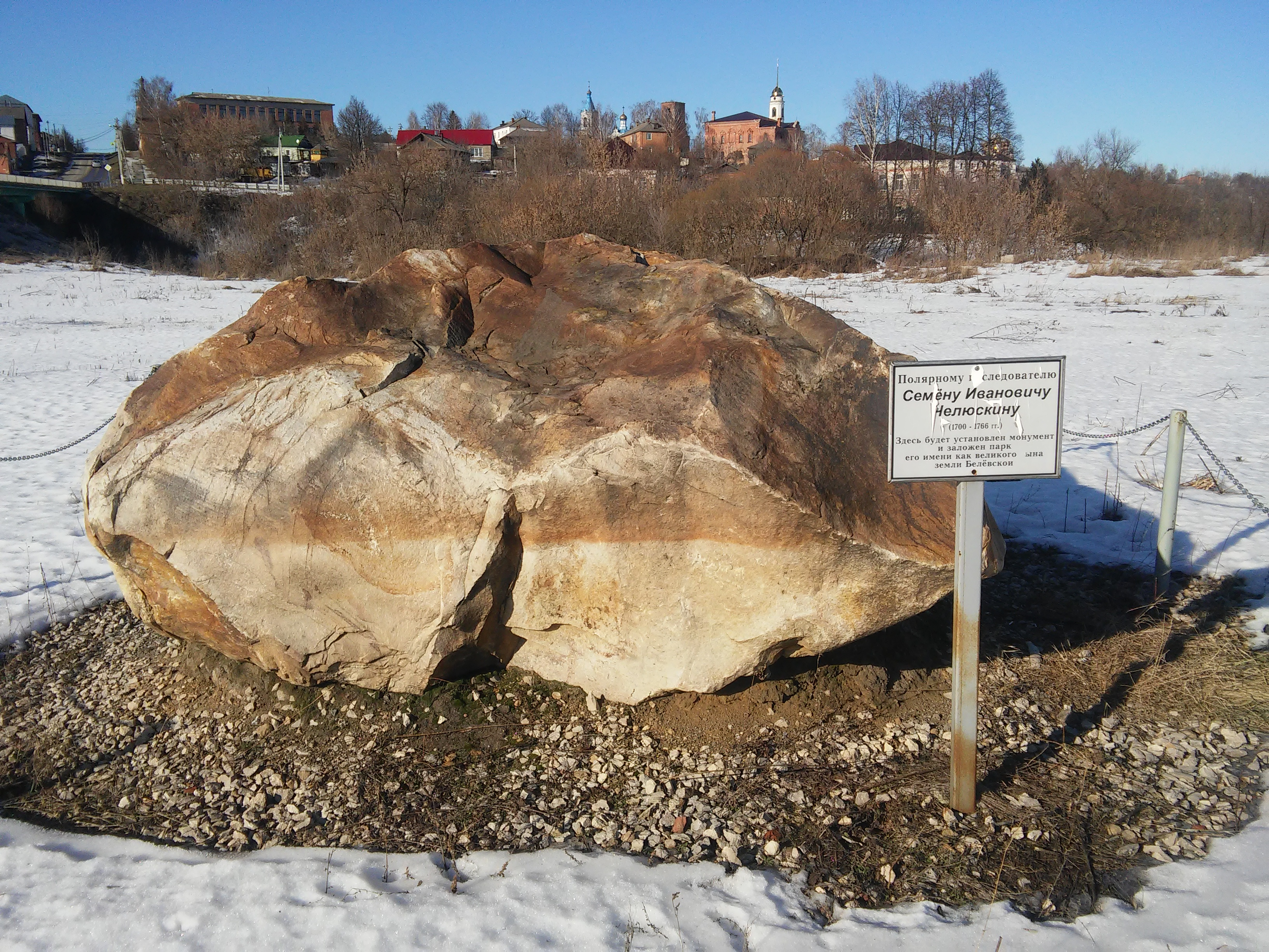 Надпись на табличке: Полярному исследователю Семену Ивановичу Челюскину (1700-1766 гг.) Здесь будет установлен монумент и заложен парк его имени, как великого сына земли Белёвской